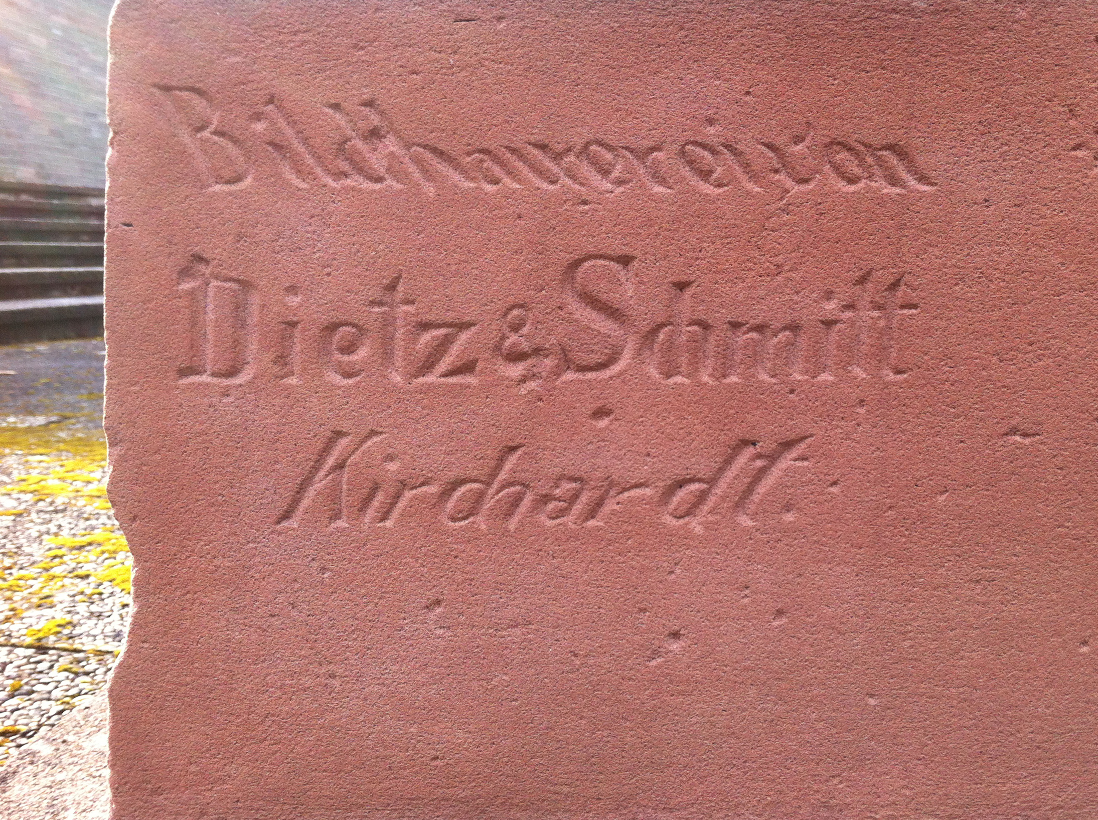 Kriegerdenkmal Eschelbronn